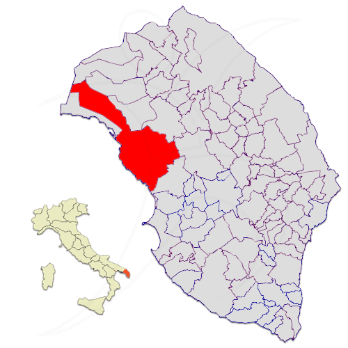 Il territorio del comune di Nardò in provincia di Lecce